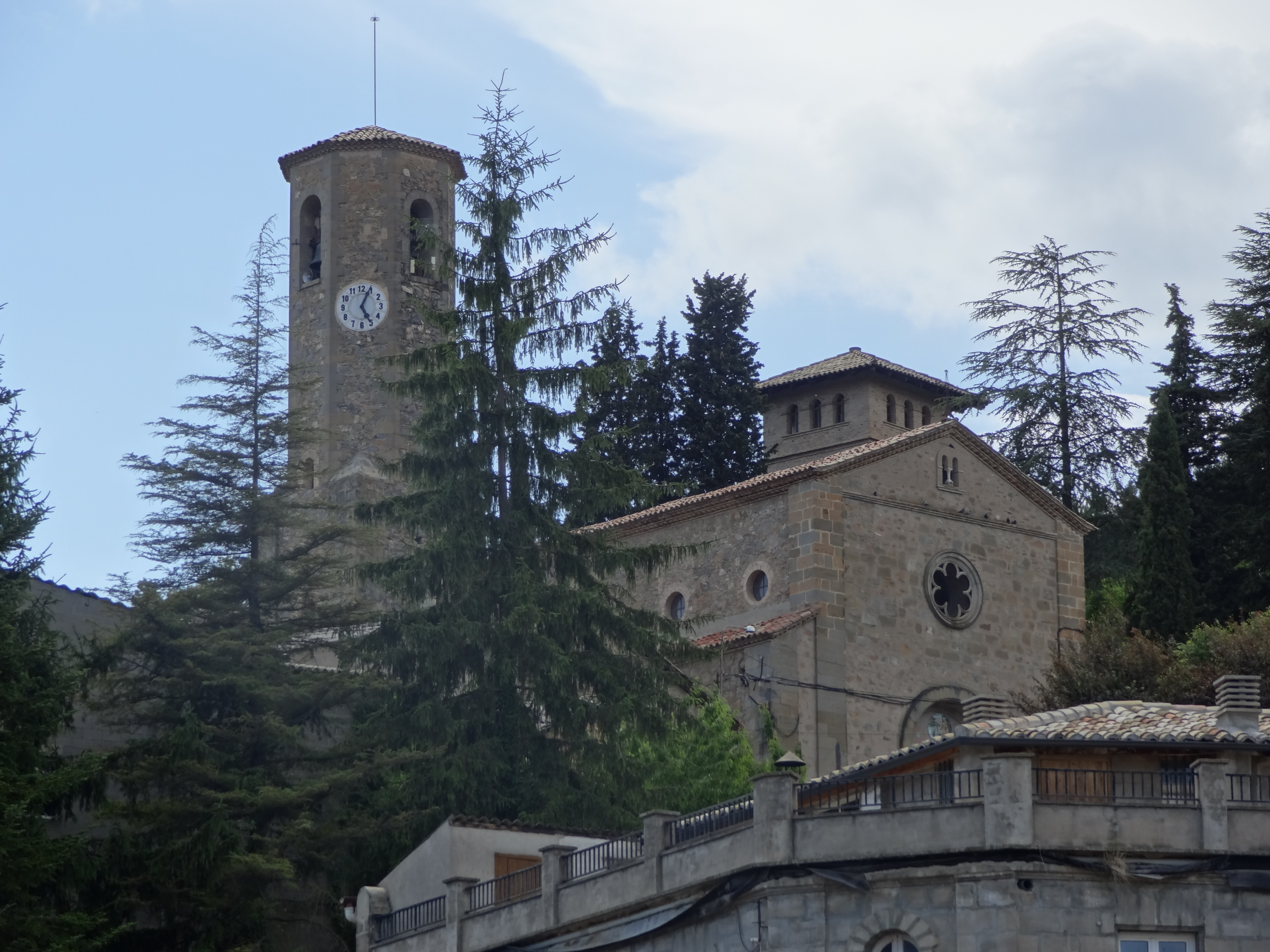 Església Vilada